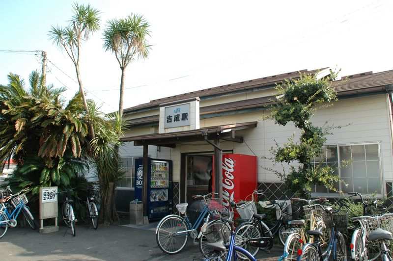 JR-Shikoku(JAPAN) Kotoku Line, Yoshinari Sta. photo by 2005.9.18